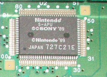 En algunas revisiones posteriores de la Super Nintendo, los "chips" de sonido (S-SMP y S-DSP) fueron unificados en uno solo.